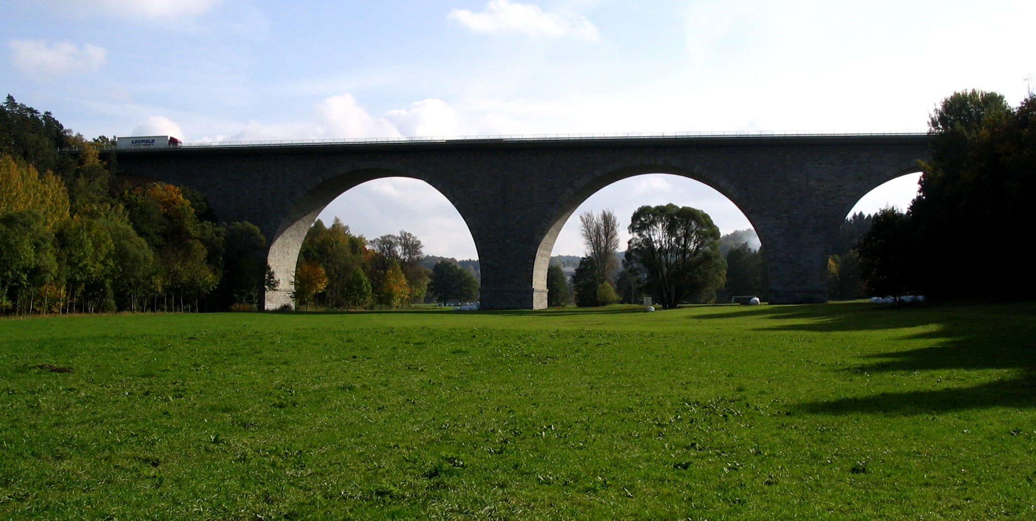 Weissensander Brücke bei Lengenfeld / Vogtland